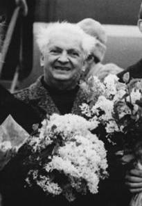 H. Steiner, Heinz-Ulrich Walther, E. Riedeberger, G. Seyfert Zentralbild Mittelstädt 29.1.68 DDR-Eiskunstläufer wieder zu Haus. Mit einer Silber- und einer Bronzemedaille im Gepäck trafen am Nachmittag des 29. Januar die DDR-Eiskunstläufer von den Europameisterschaften aus Västeras mit einer Chartermaschine auf dem Flughafen Berlin-Schönefeld ein. Vizepräsident Erich Riedeberger überbrachte im Namen des DTSB den ersten Gruß an die erfolgreichen Aktiven. V.r.n.l.: Heidemarie Steiner, Heinz-Ulrich Walther, Erich Riedeberger und Gabriele Seyfert. Abgebildete Personen: Seyfert, Gabriele: Eiskunstläuferin, Olympiade 1964 und 1968, DDR Steiner, Heidemarie: Eiskunstläuferin, SC Dynamo Berlin, Olympiade 1968, DDR Walther, Heinz-Ulrich: Eiskunstläufer, Paarlauf, SC Dynamo Berlin, Olympiateilnehmer 1968, DDR Riedeberger, Erich: Vizepräsident des Deutschen Turn- und Sportbundes (DTSB), DDR